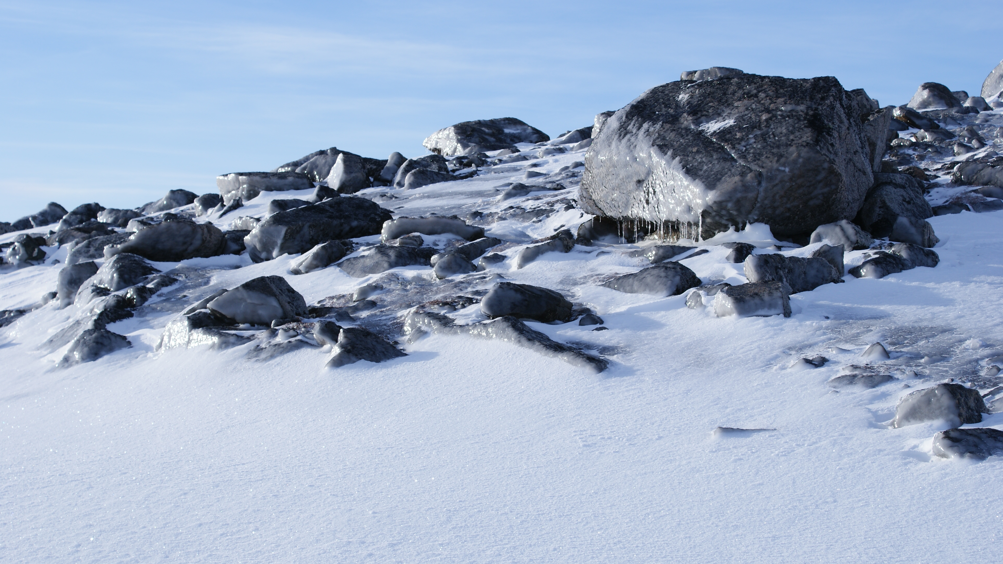 Kulusuk, Greenland. Rime ice.